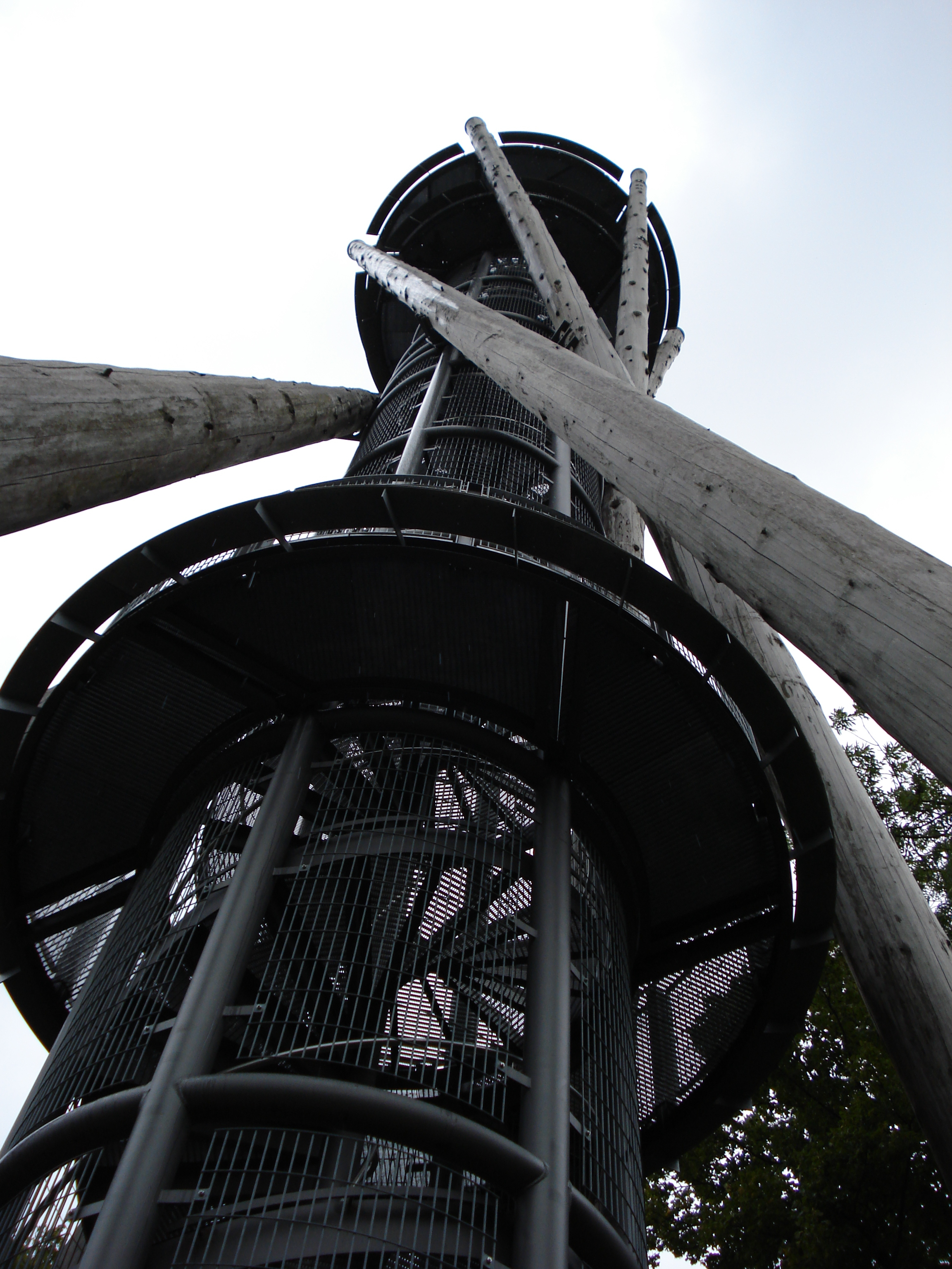 Schlossberg Lookout Tower in Freiburg, Germany, 2008